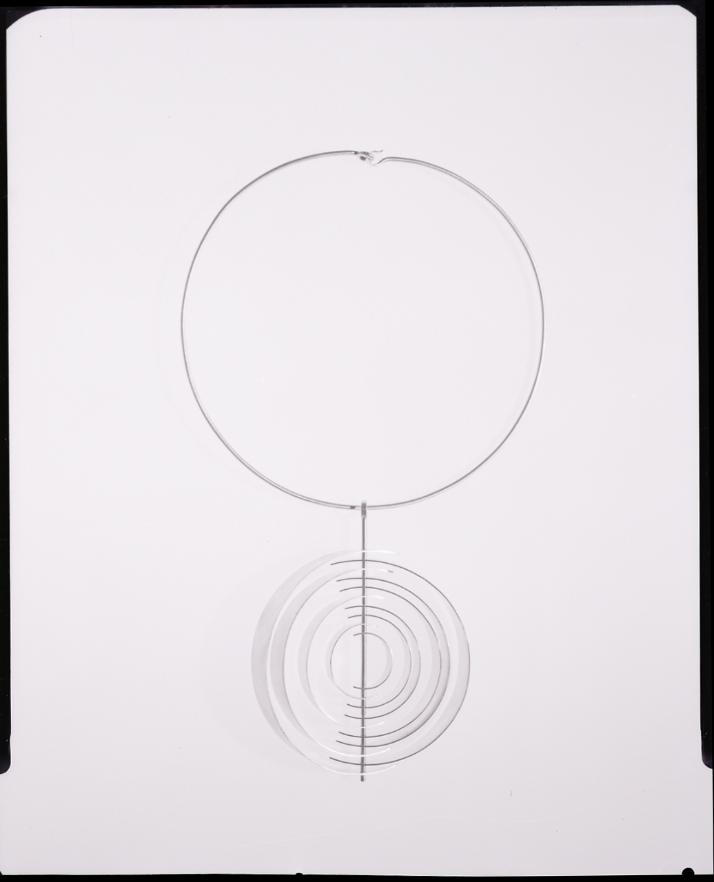 Servizio fotografico : Italia, 1964 / Paolo Monti. - Buste: 9, Fototipi: 9 : Negativo b/n, gelatina bromuro d'argento/ pellicola ; 10x12. - ((Serie costituita da 9 buste sciolte di negativi identificati con i nn.: 10338, 10339, 10340, 10341, 10342, 10343, 10344, 10345, 10346. - La busta identificata con il n. 10339 contiene una diapositiva b/n. - Fonte: Agenda di Paolo Monti: Monti/ 2/ 6 giugno 1964 - 31 marzo 1966/ 8194-12420 (1964-1966), presso Archivio Paolo Monti